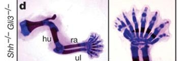 Shh-/- GLI3-/- in der Extremität